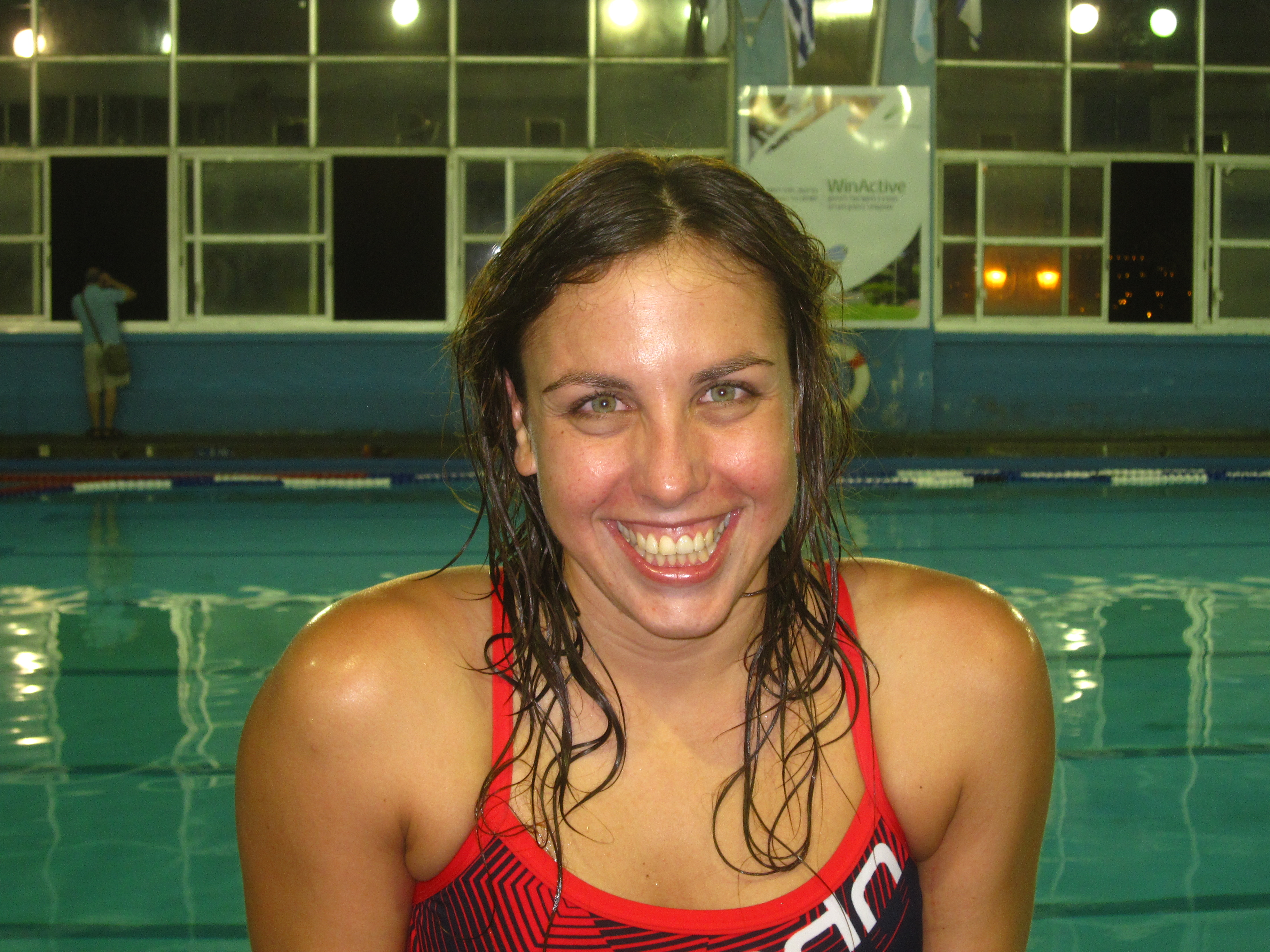 עדי ביכמן, במשחק הגמר של אליפות ישראל בכדורמים לנשים, 2011